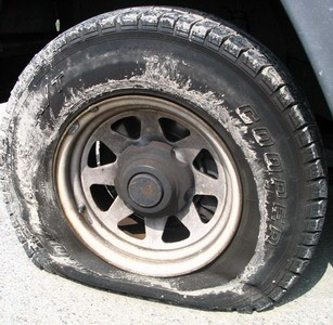 Flat tire.